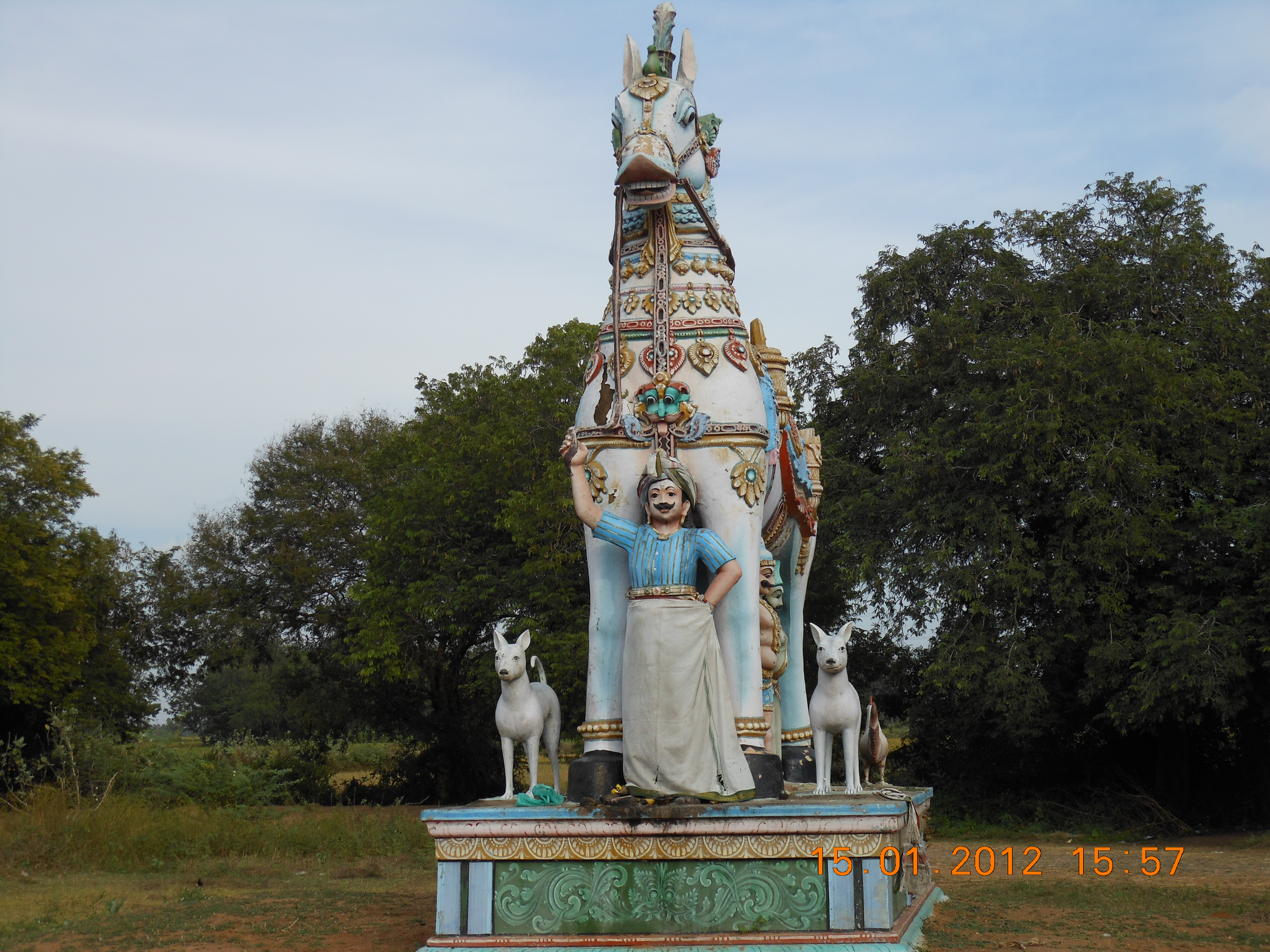 அருள்மிகு கொடைமுகி அய்யனார் ஆலய குதிரை வாகனம்